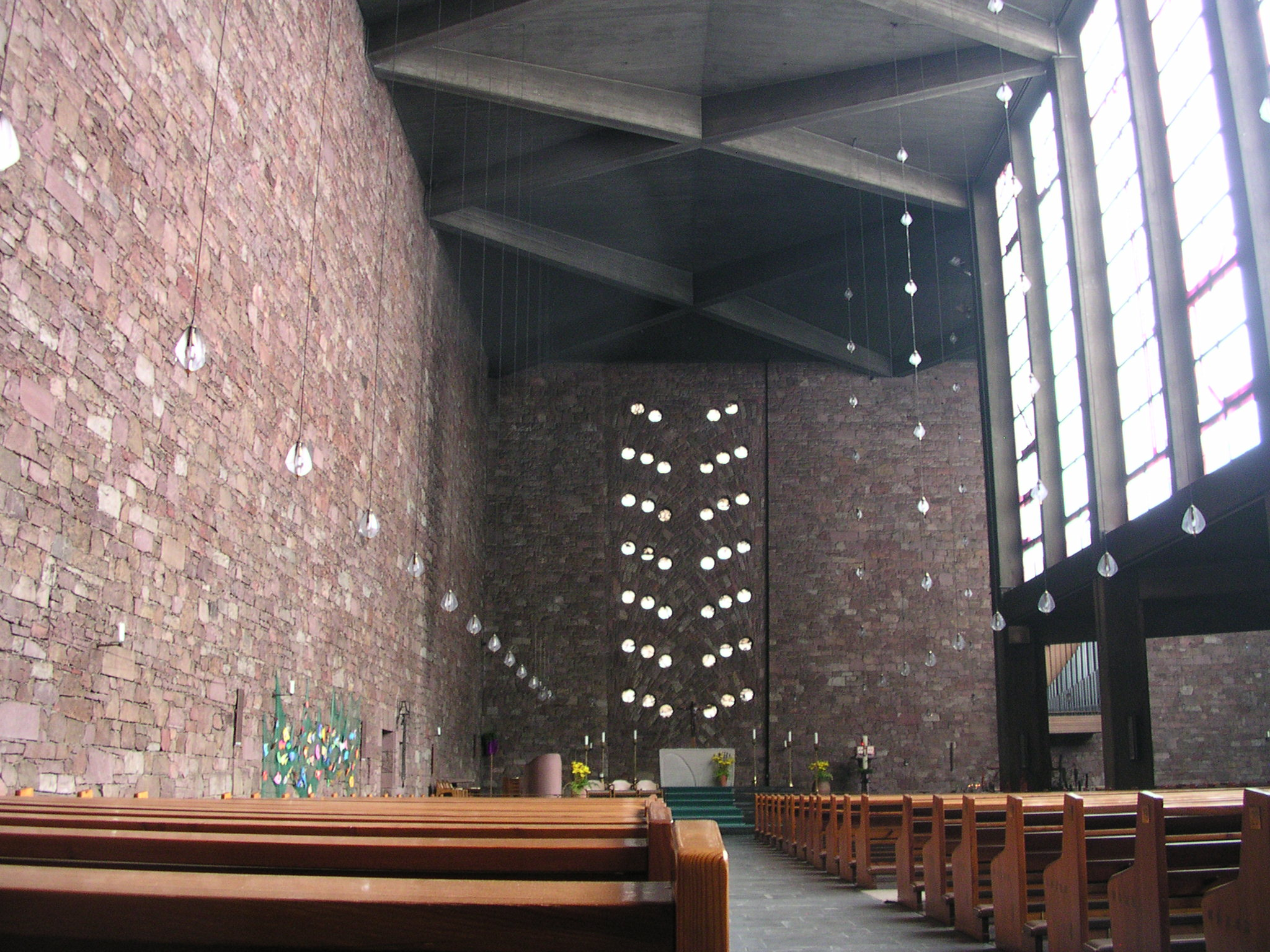 Annakirche in Düren. Auf anderen Bildern ist zu sehen: die Wand hinter dem Altar an der Außenseite, die Wand rehts vom Altar, die Decke über dem Altar und dem rechten Flügel, das niedrige Seitenschiff auf der rechten Seite.